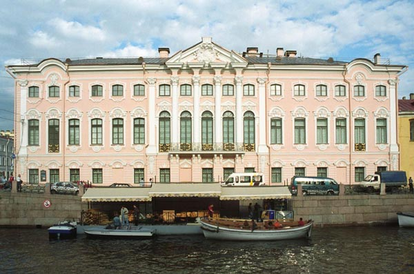 Строгановский дворец, Санкт-Петербург